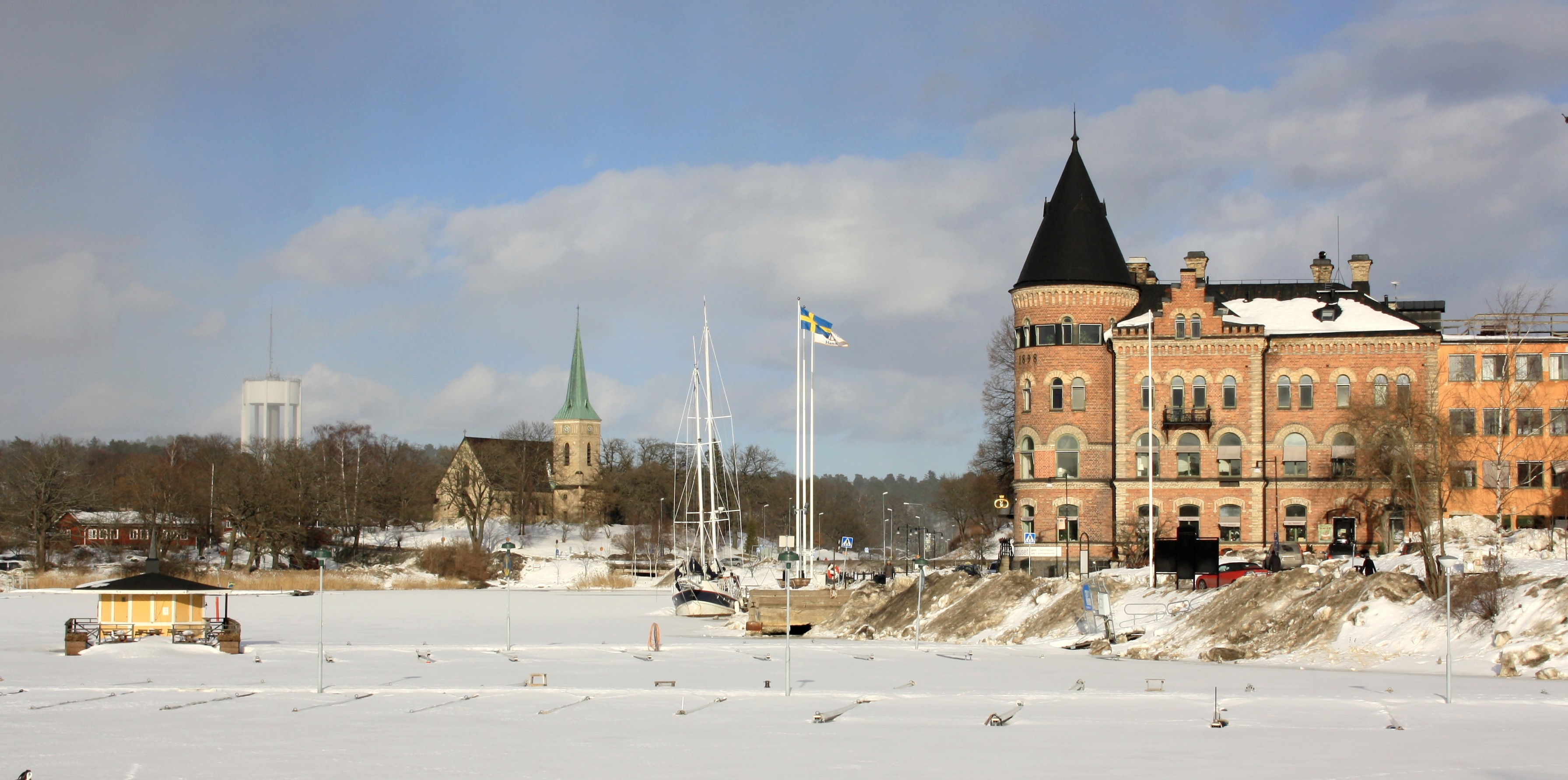 Hamnen i Gustavsberg, delar av det gamla fabriksområdet till höger. Mars 2010.